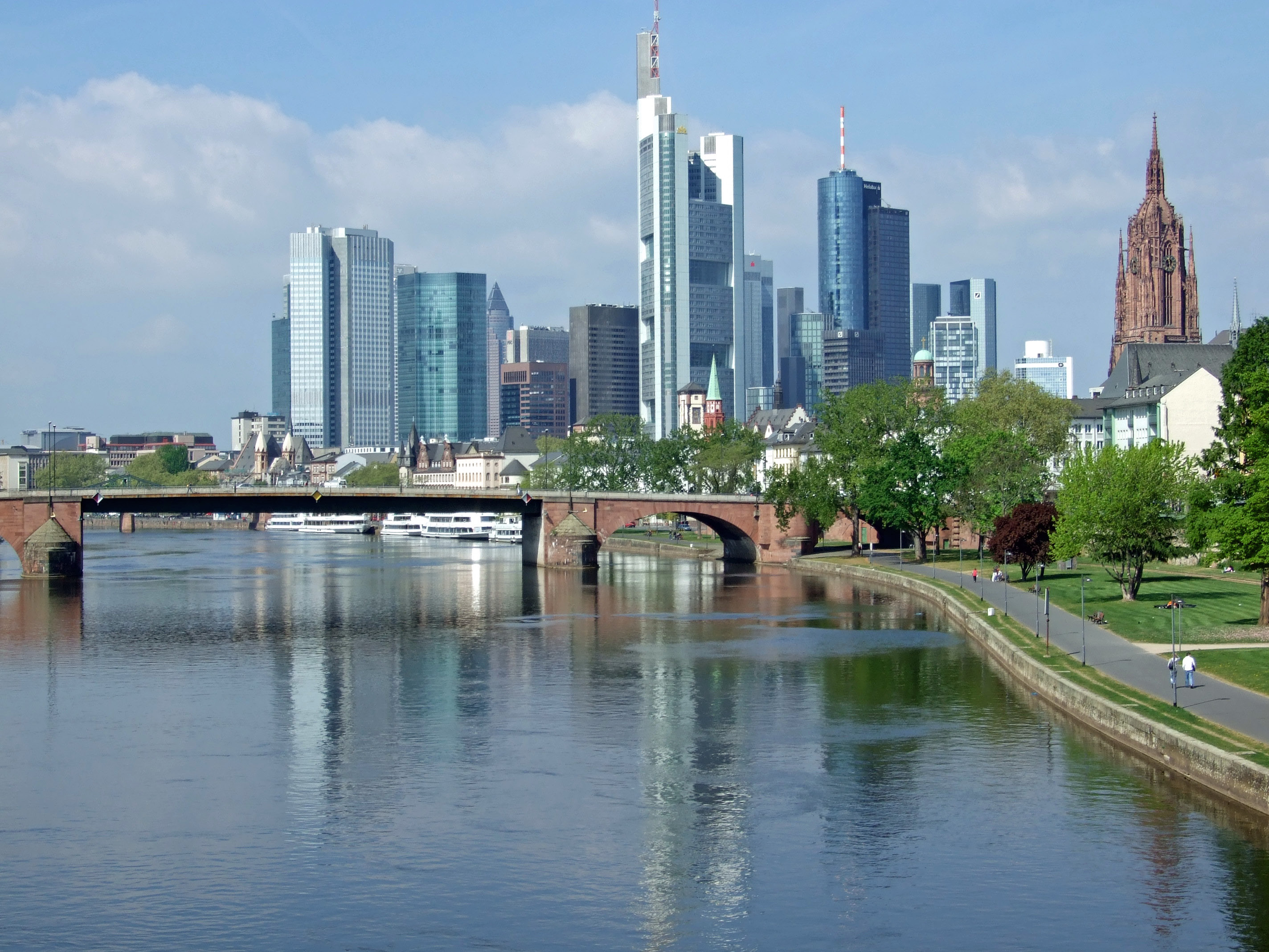 Skyline von Frankfurt, über dem Main von der „Ignatz-Bubis-Brücke“ aus.